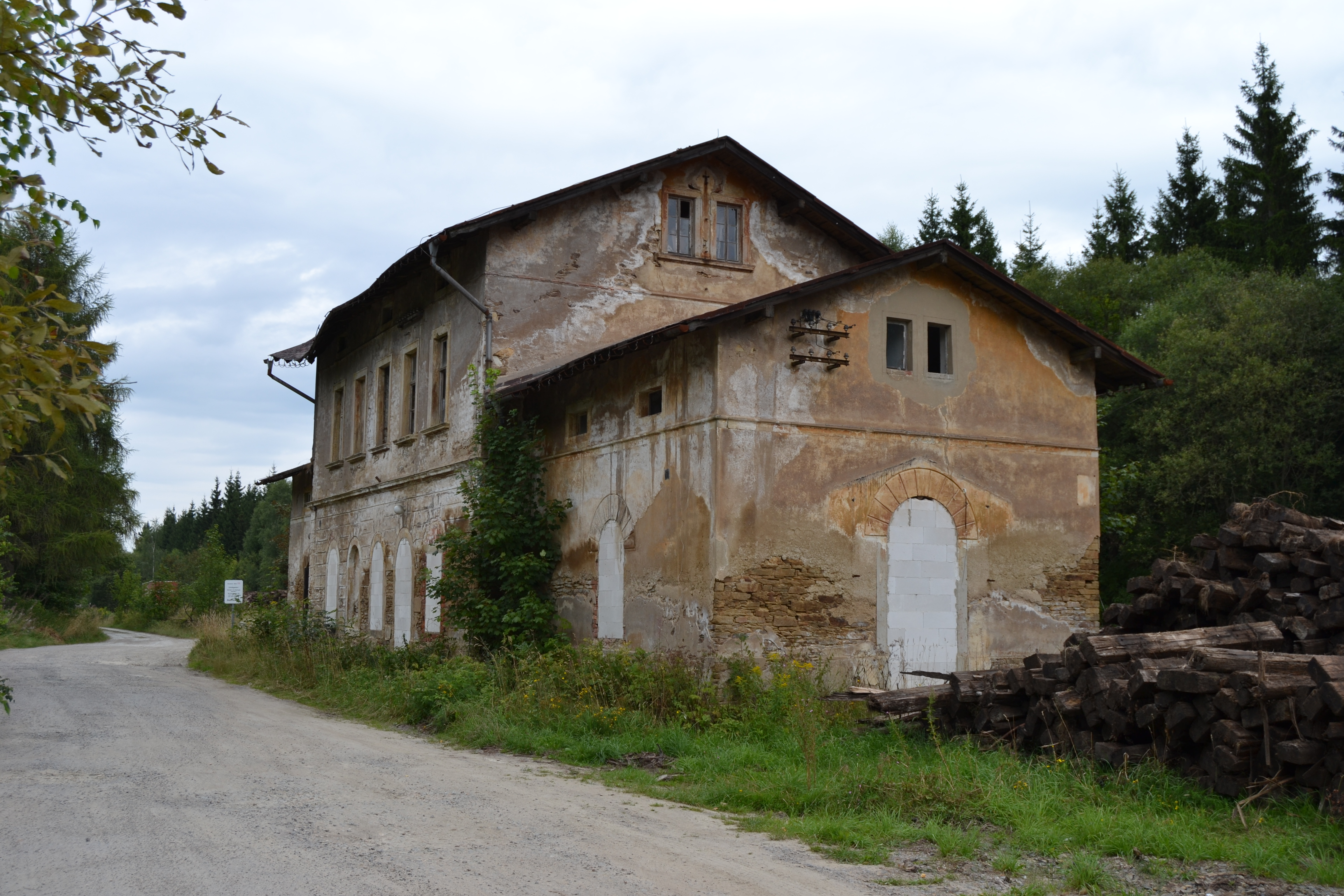 Blick auf das ehem. Empfangsgebäude (Straßenseite) des Bahnhofs Gelobtland im Erzgebirge.